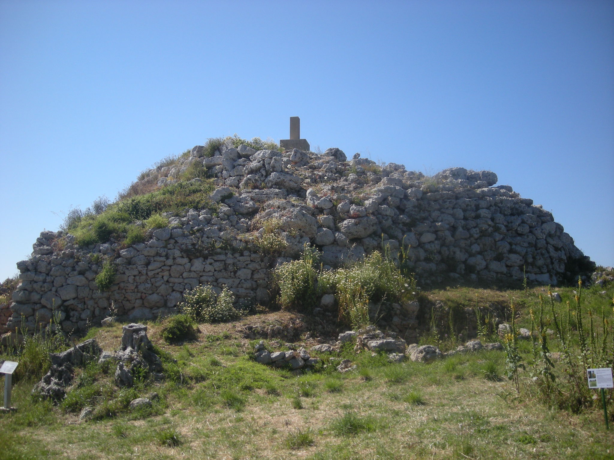 So na Caçana